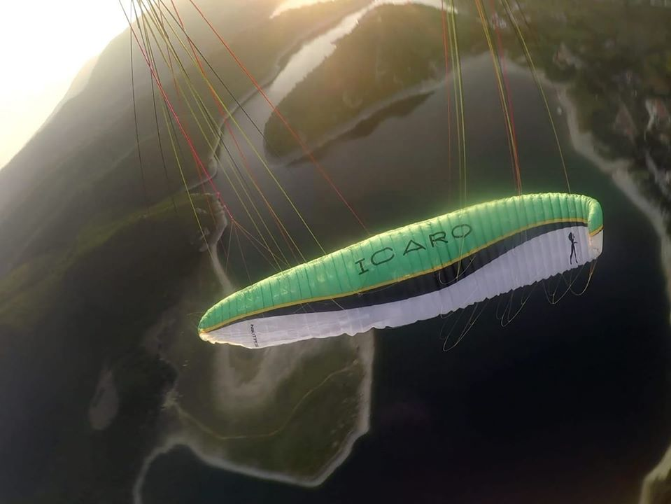 Castel di Tora vista dall'inquadratura di un parapendio Acrobatico